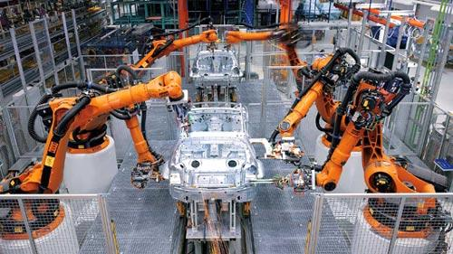 شرکت ها و کارخانجات